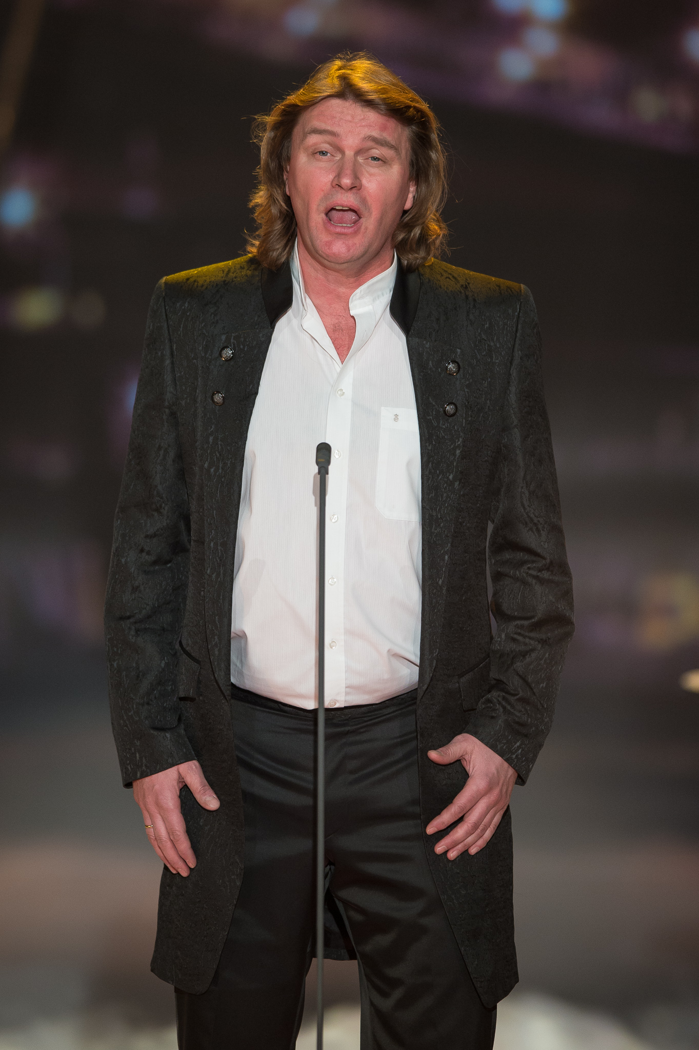 BR,Bayerisches Fernsehen,Frankenhalle,Klaus Florian Vogt,Live-Sendung,Sternstunden-Gala,Sternstundengala